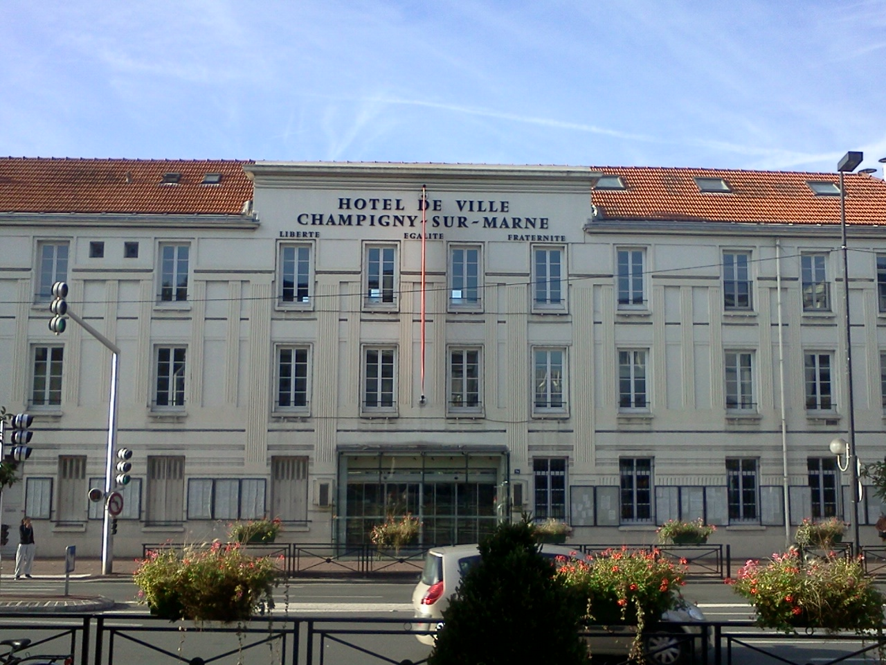 Hôtel de ville de Champigny sur Marne